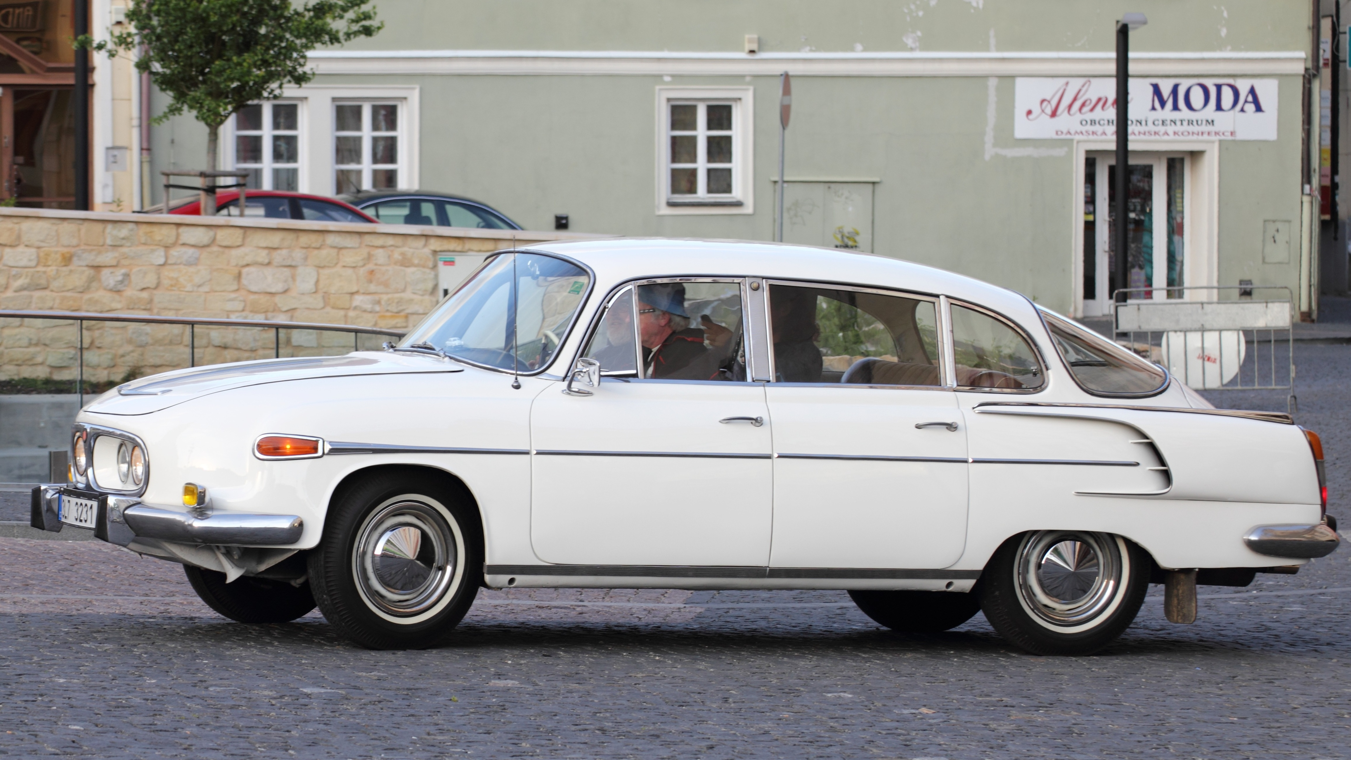 Tatra 2-603 (1967), 2013 Oldtimer Bohemia Rally